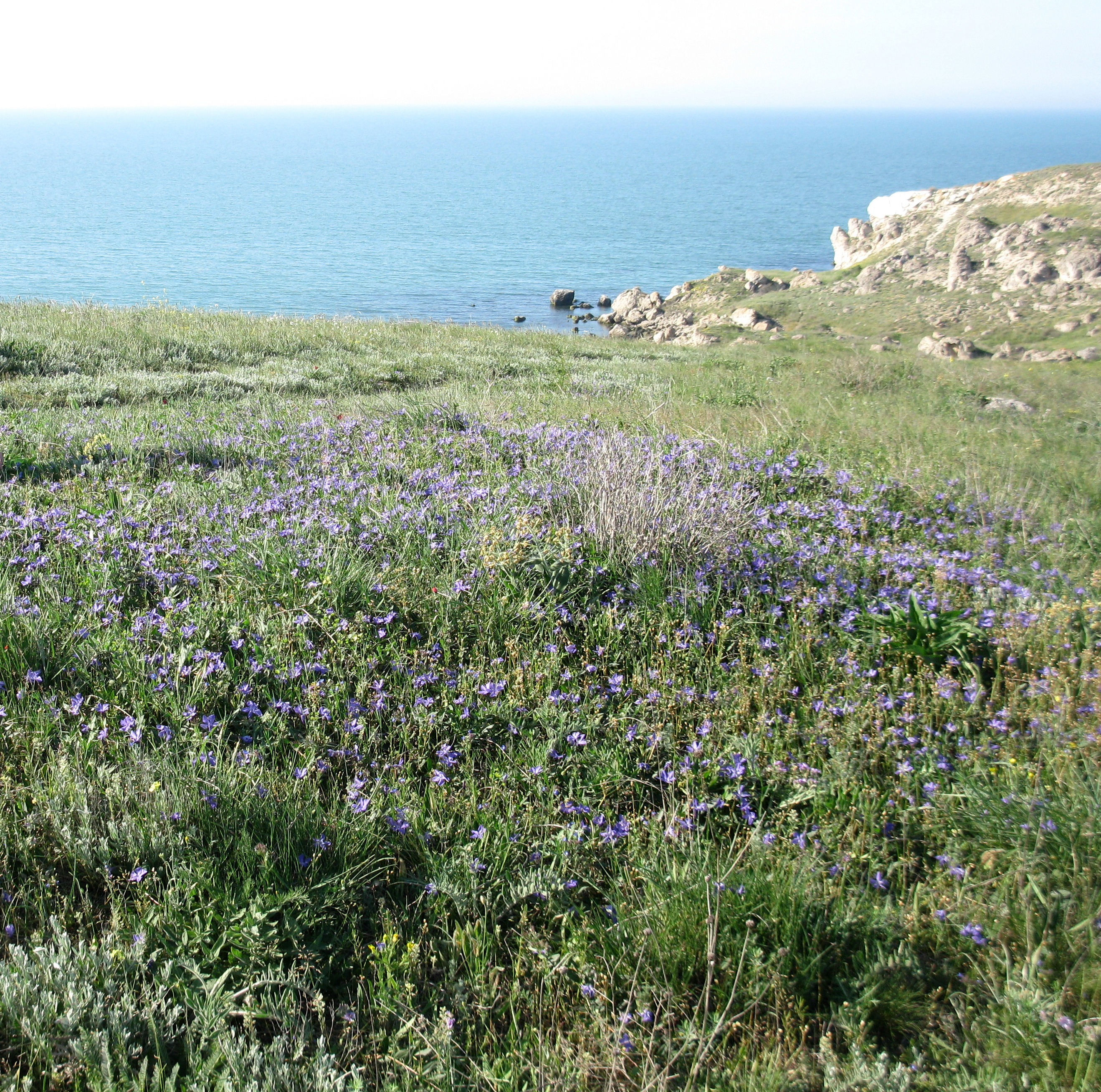 Виды Казантипа